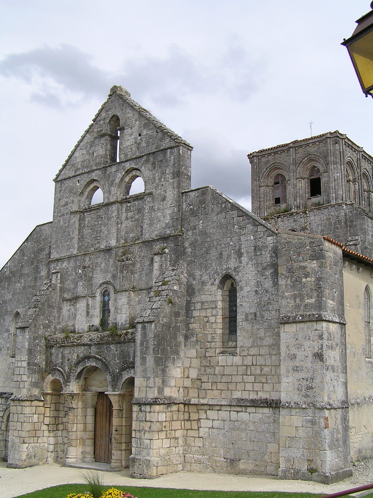 église de Genté, Charente, France